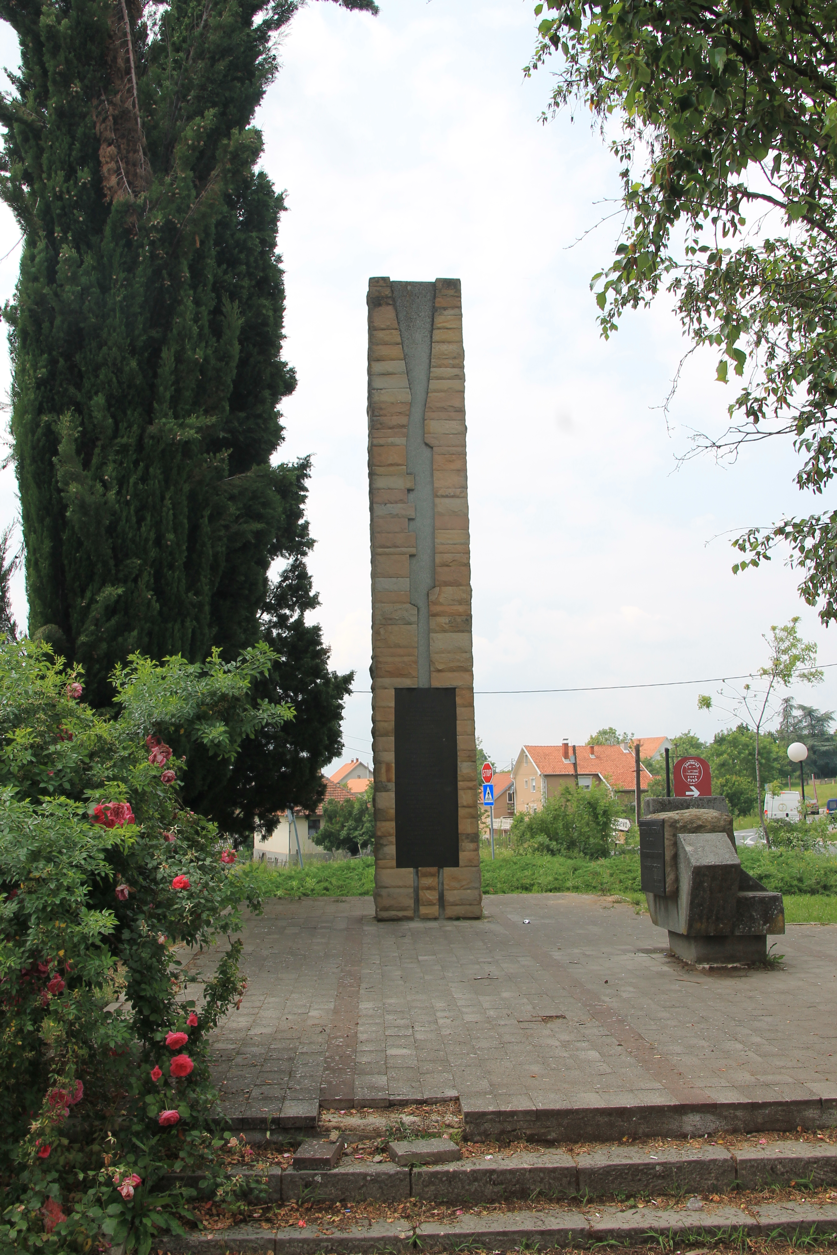 Baćevac